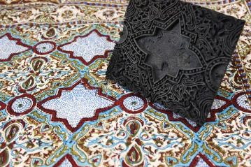 Крайното изделие и печата, с помощта на който е произведена щампата